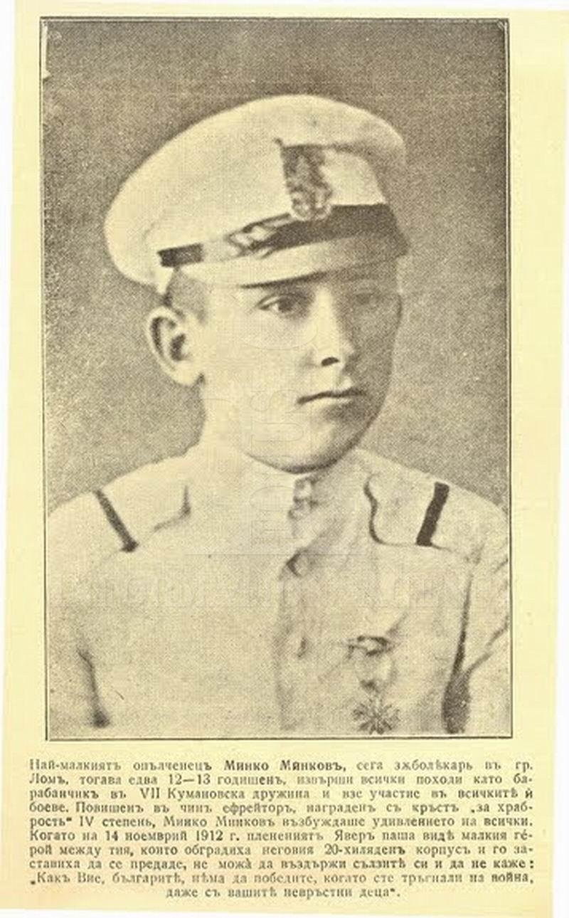 Минко Н. Минков